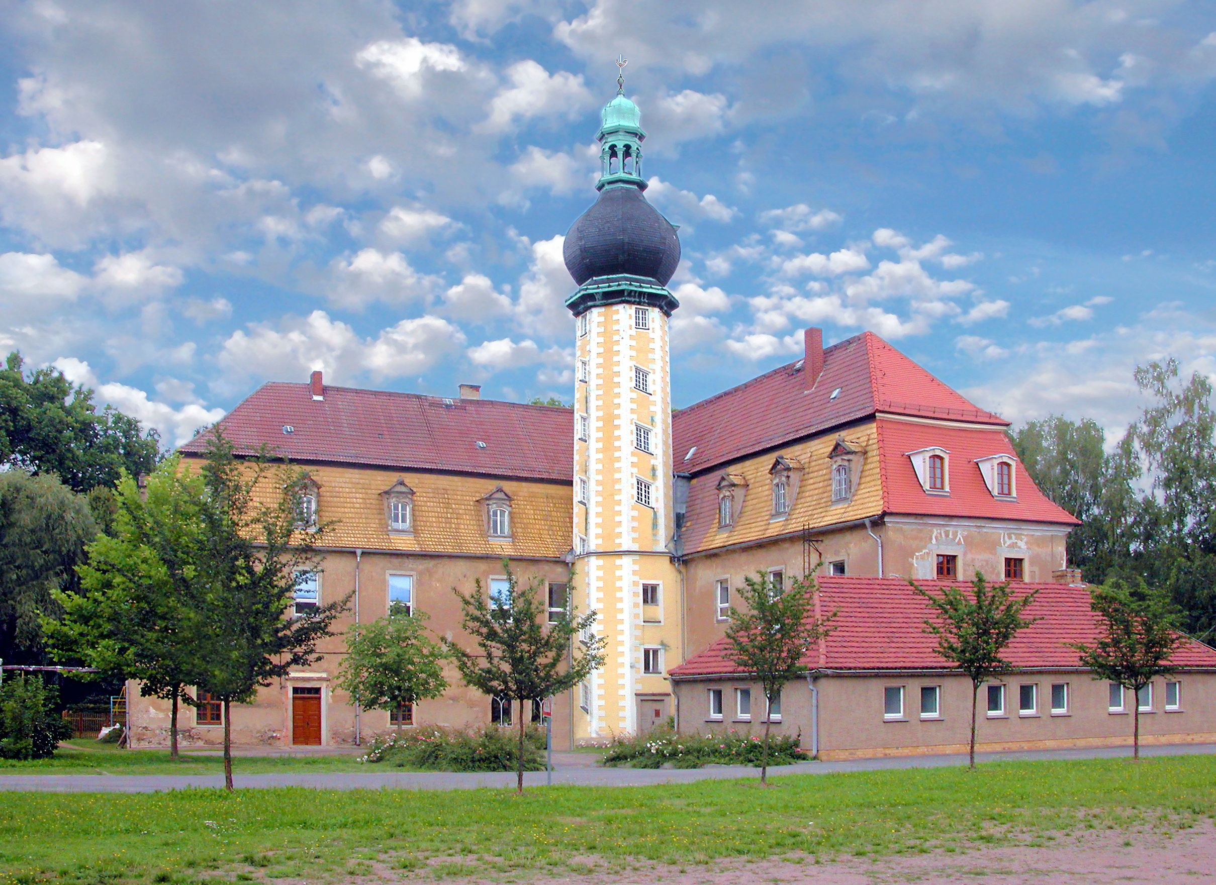 10.08.2006 04758 Hof (Naundorf Sa.): Neues Schloß, Barock (1750). Als Schule genutzt. [DSCN11098.TIF]20060810310DR.JPG(c)Blobelt